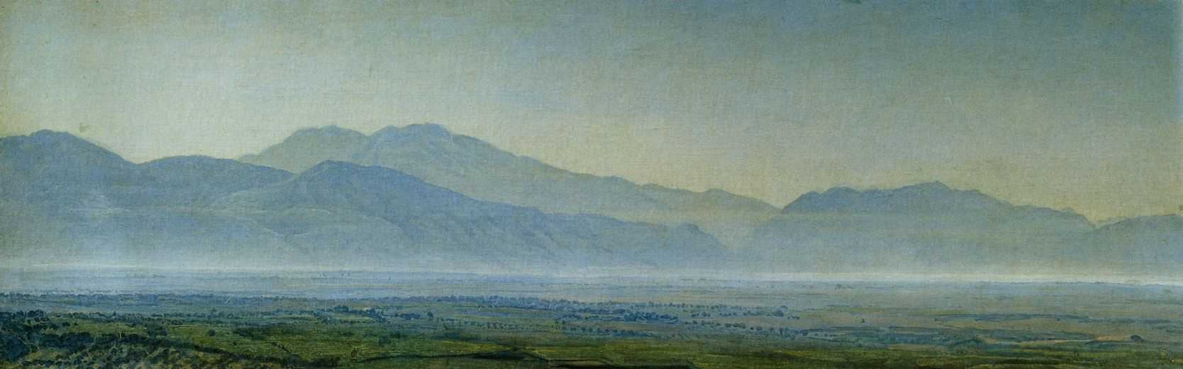 Понтийские болота. 1838г